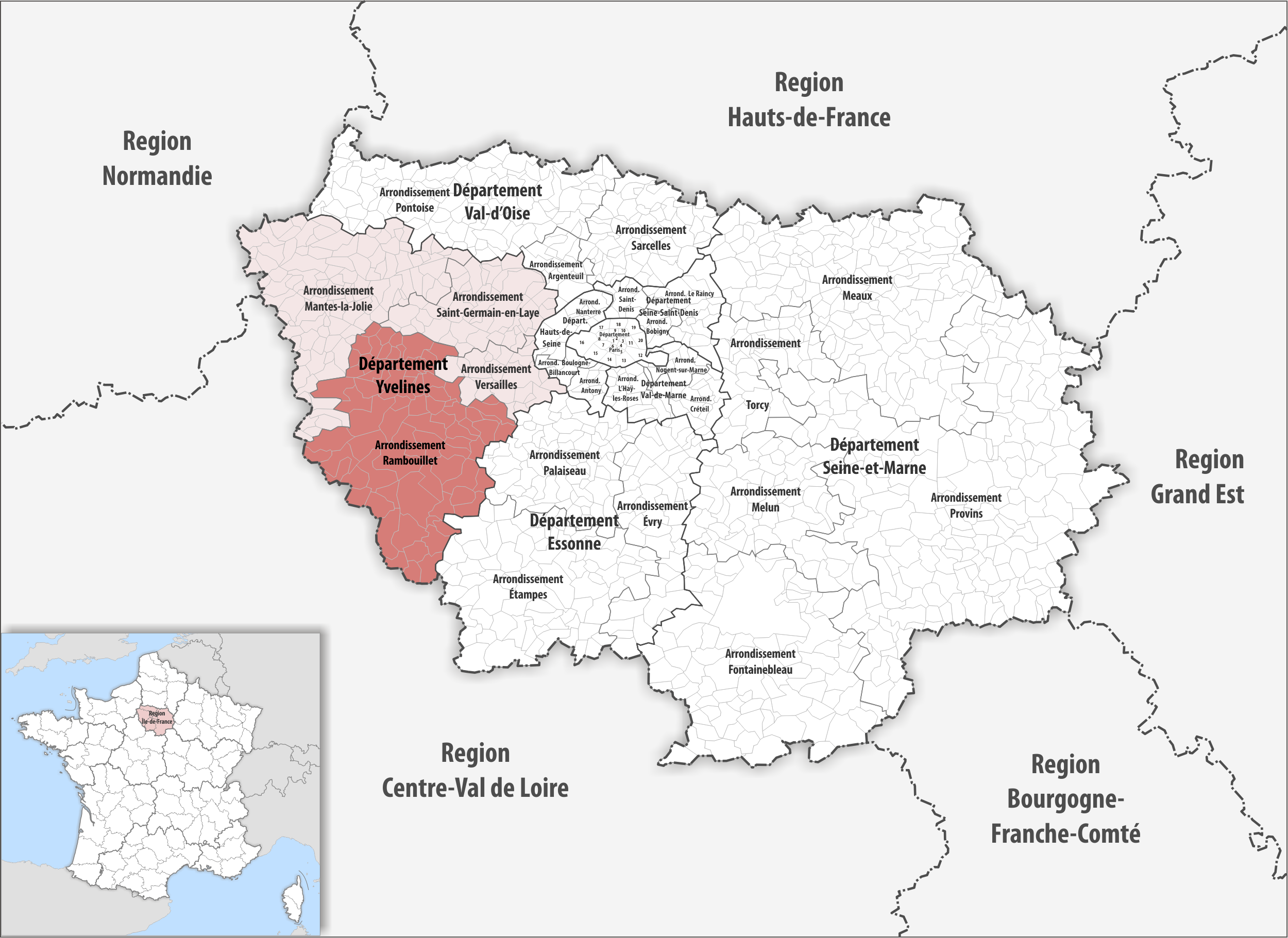 Lage des Arrondissements Rambouillet